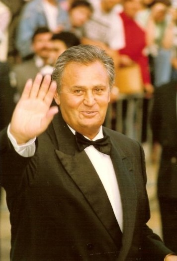 Roger Hanin au festival de Cannes